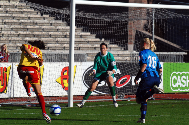 Guðbjörg Gunnarsdóttir defends the Djurgårdens goal against Marta of Tyresö FF